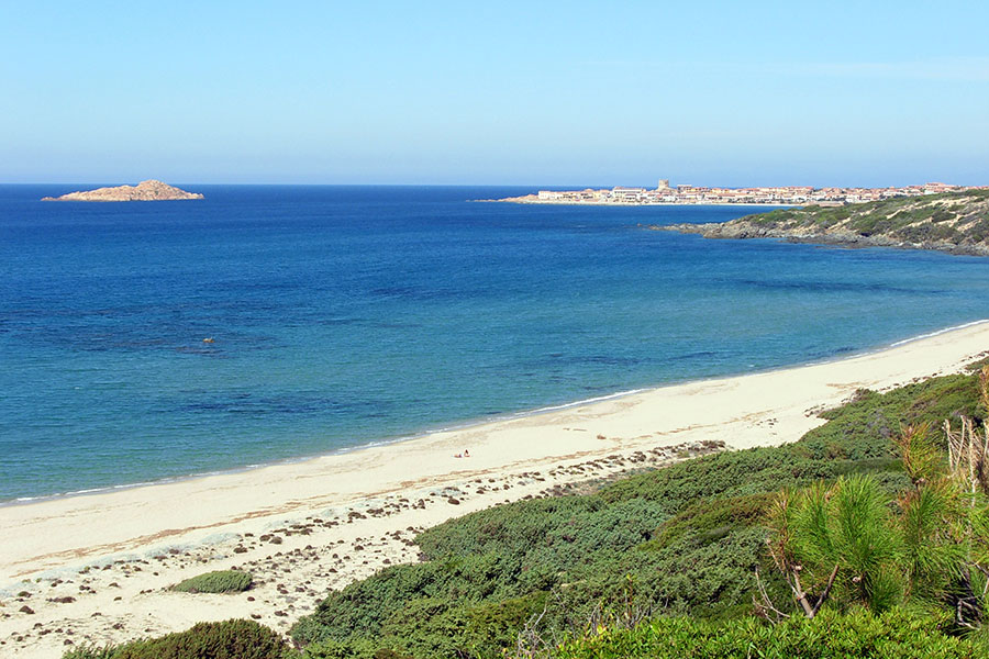 Spiaggia Li Feruli ad Isola Rossa. Sullo sfondo l'abitato e lo scoglio rossastro da cui deriva il toponimo.